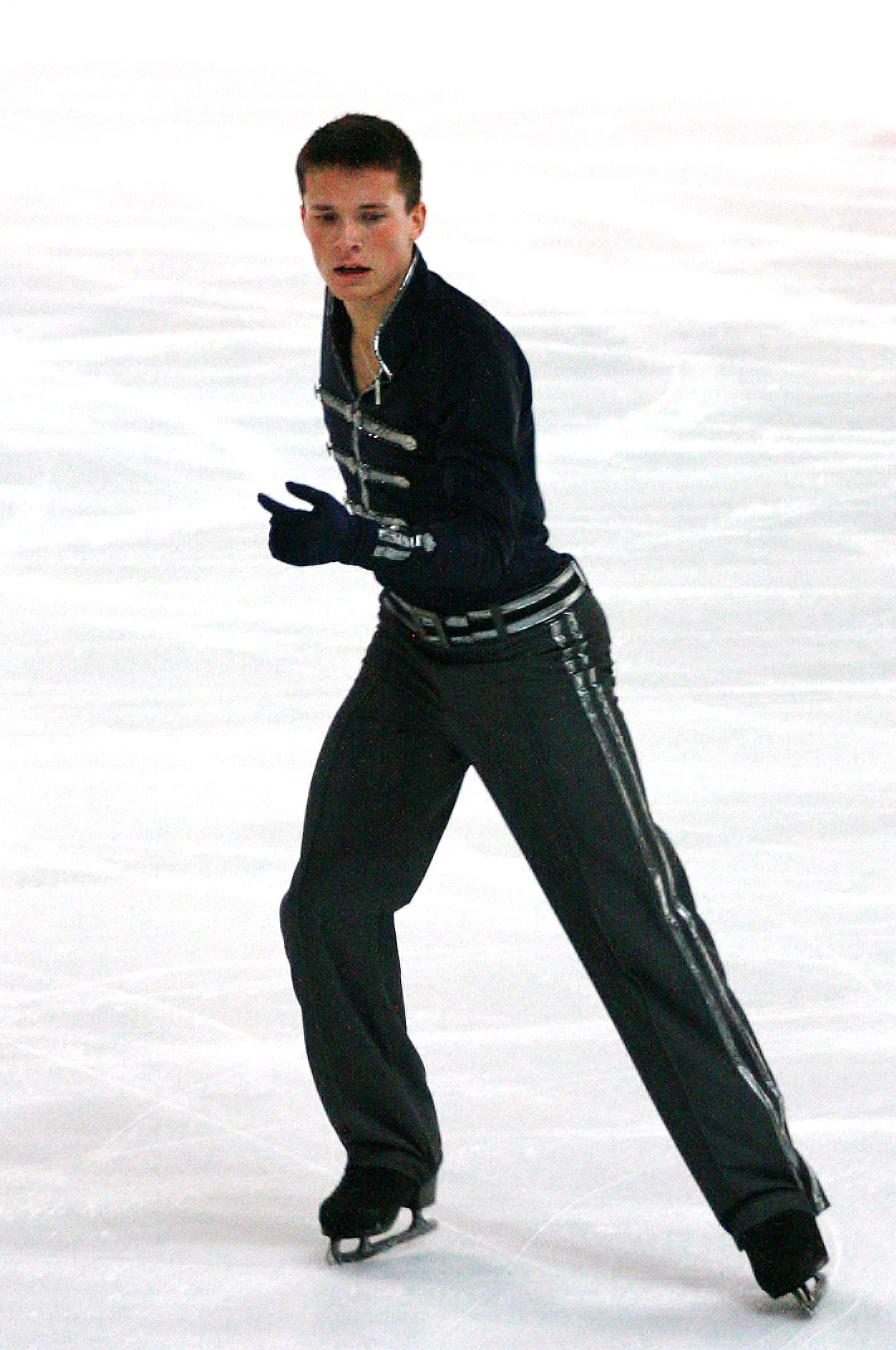 Ондрей Шпигль (Швеция) на 2013 Nebelhorn Trophy